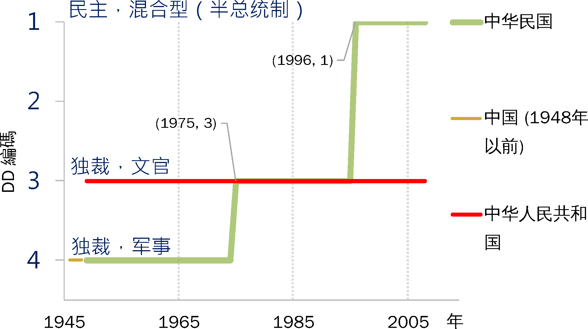 中國政體分類歷史變化，根據zh:民主與獨裁指數